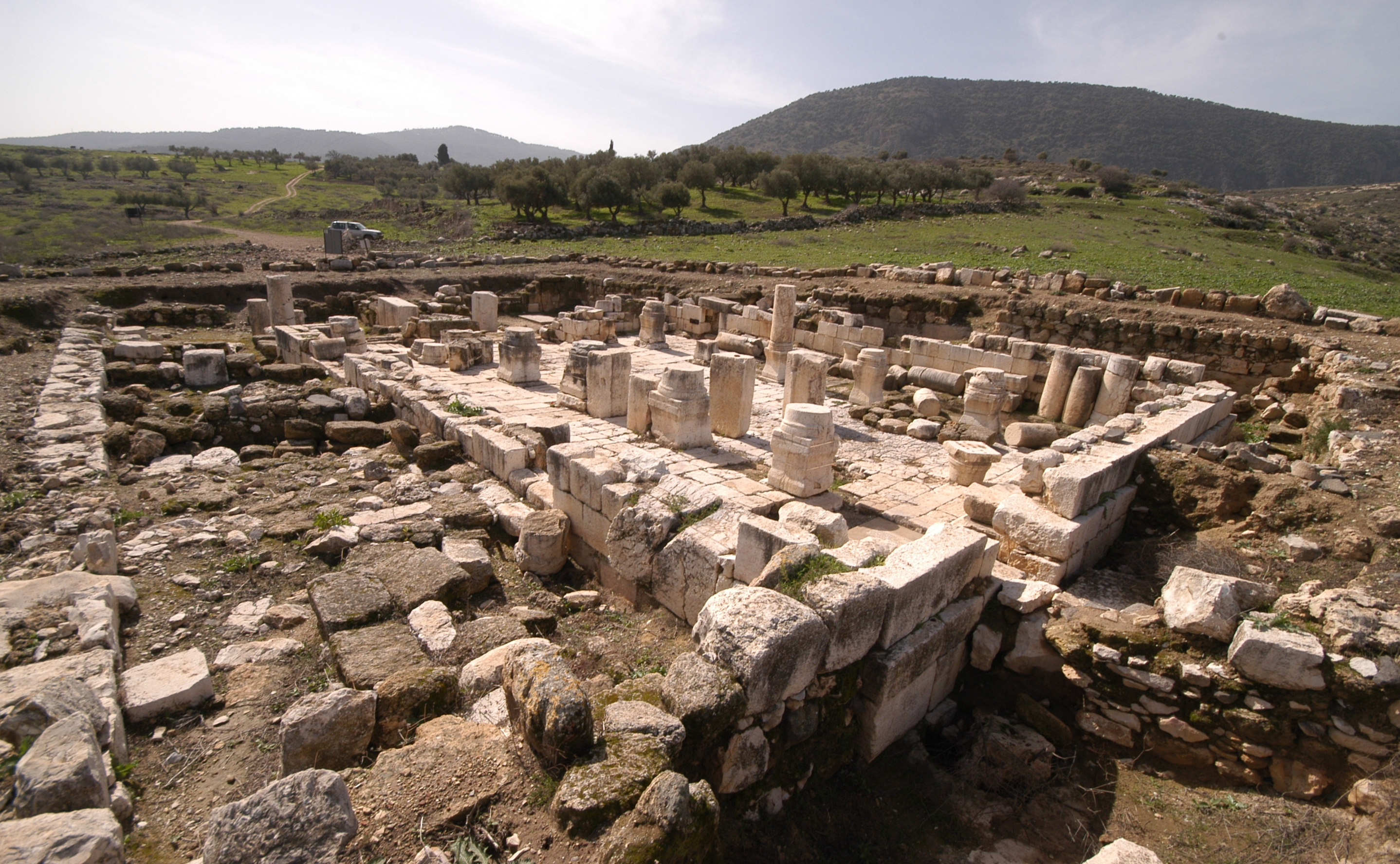 בית הכנסת של קהילת מרות - בית הכנסת הוא מהמאה ה-4, ימי חיבור התלמוד, והושלם במאה ה-7. חזית הבניין הייתה בדרום והיא קושטה באבנים מעוטרות.